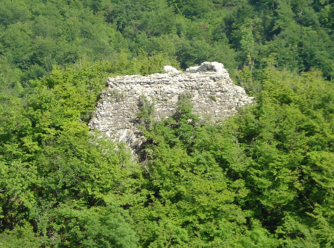 Крепость "Гялярсян - Гёрярсян"